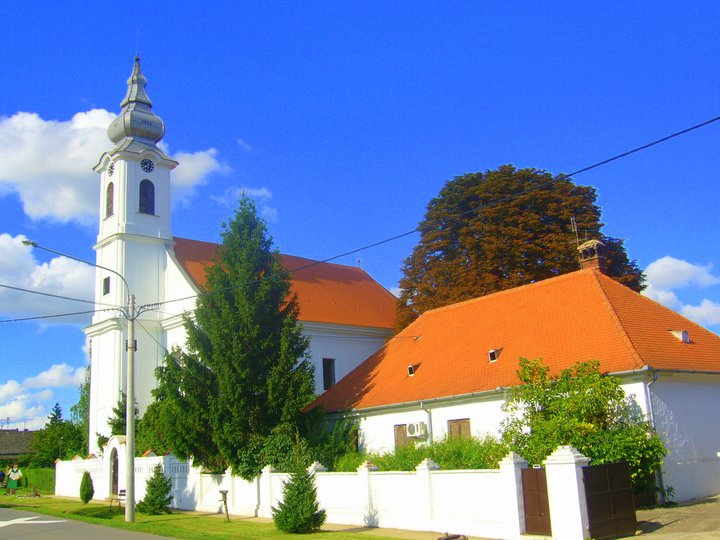 Слика: Протестантска црква у Каранцу Аутор: Милош Тодоровић